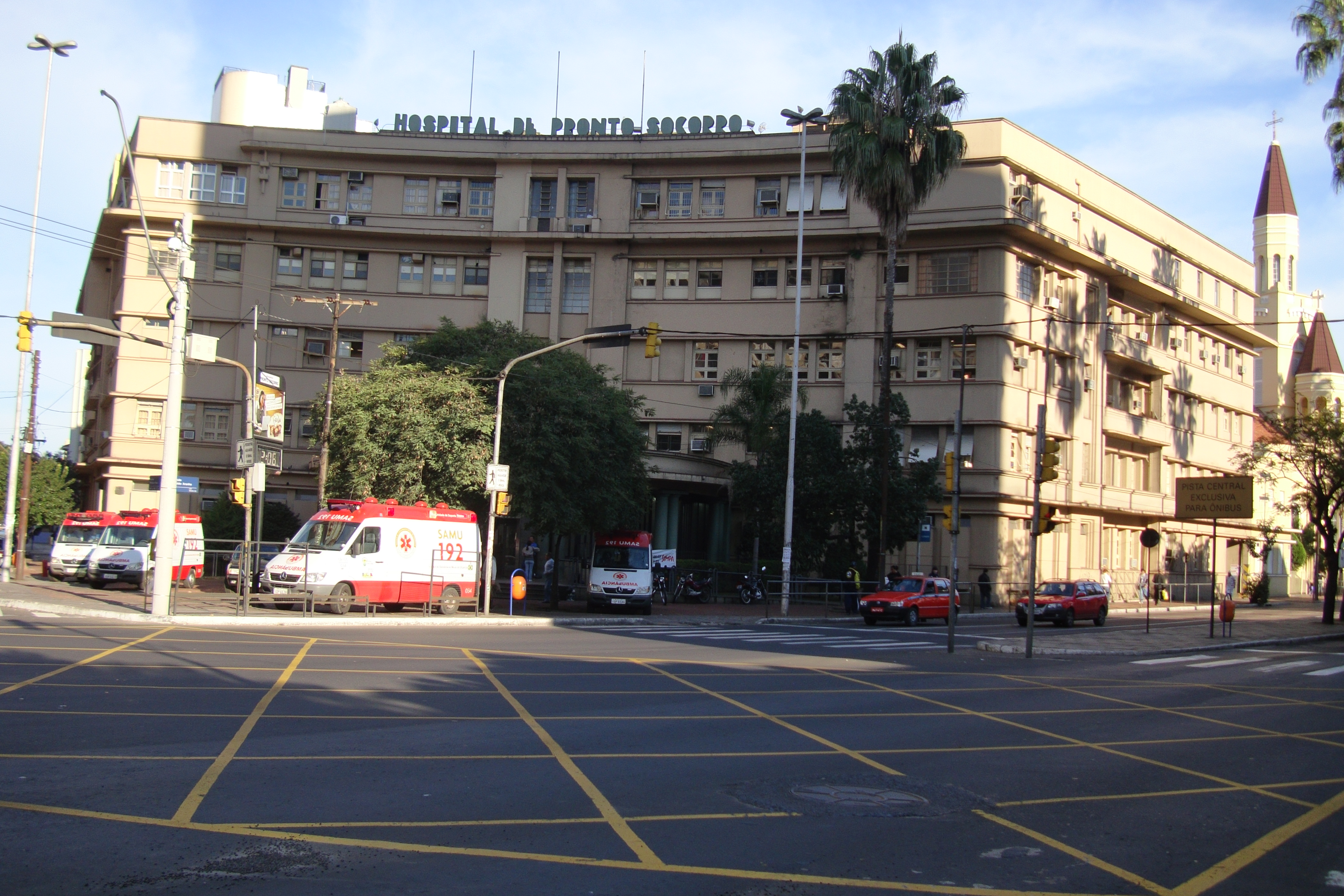 Fachada do Hospital de Pronto Socorro (HPS) de Porto Alegre, Rio Grande do Sul, Brazil